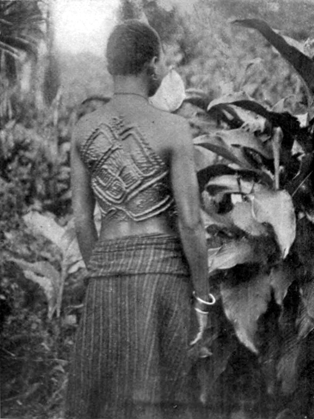 Cicatrised Batetela Woman (Lualaba-Kassai) - p. 150